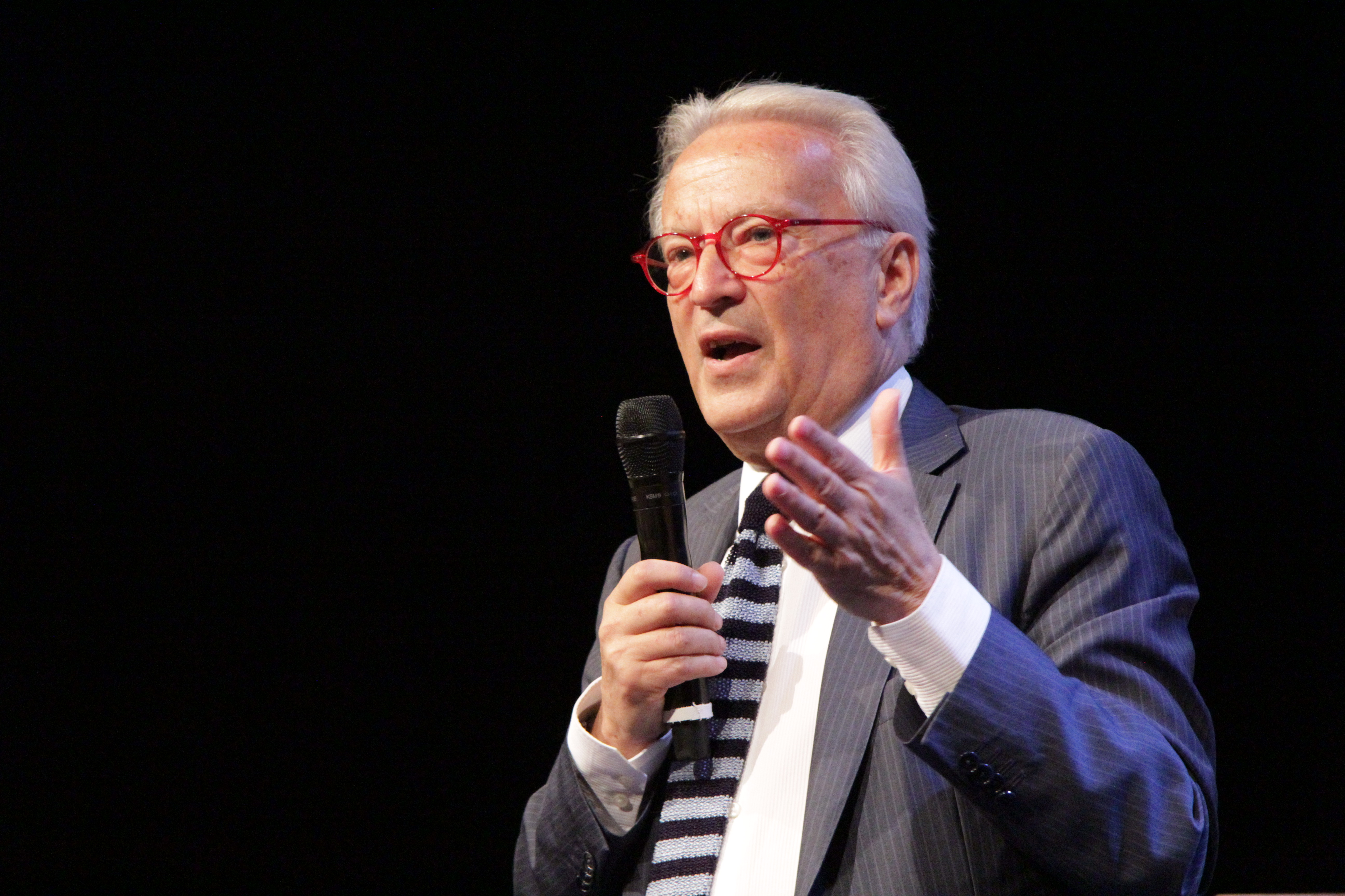 Hannes Swoboda, fractievoorzitter sociaaldemocratische fractie in het Europees Parlement.